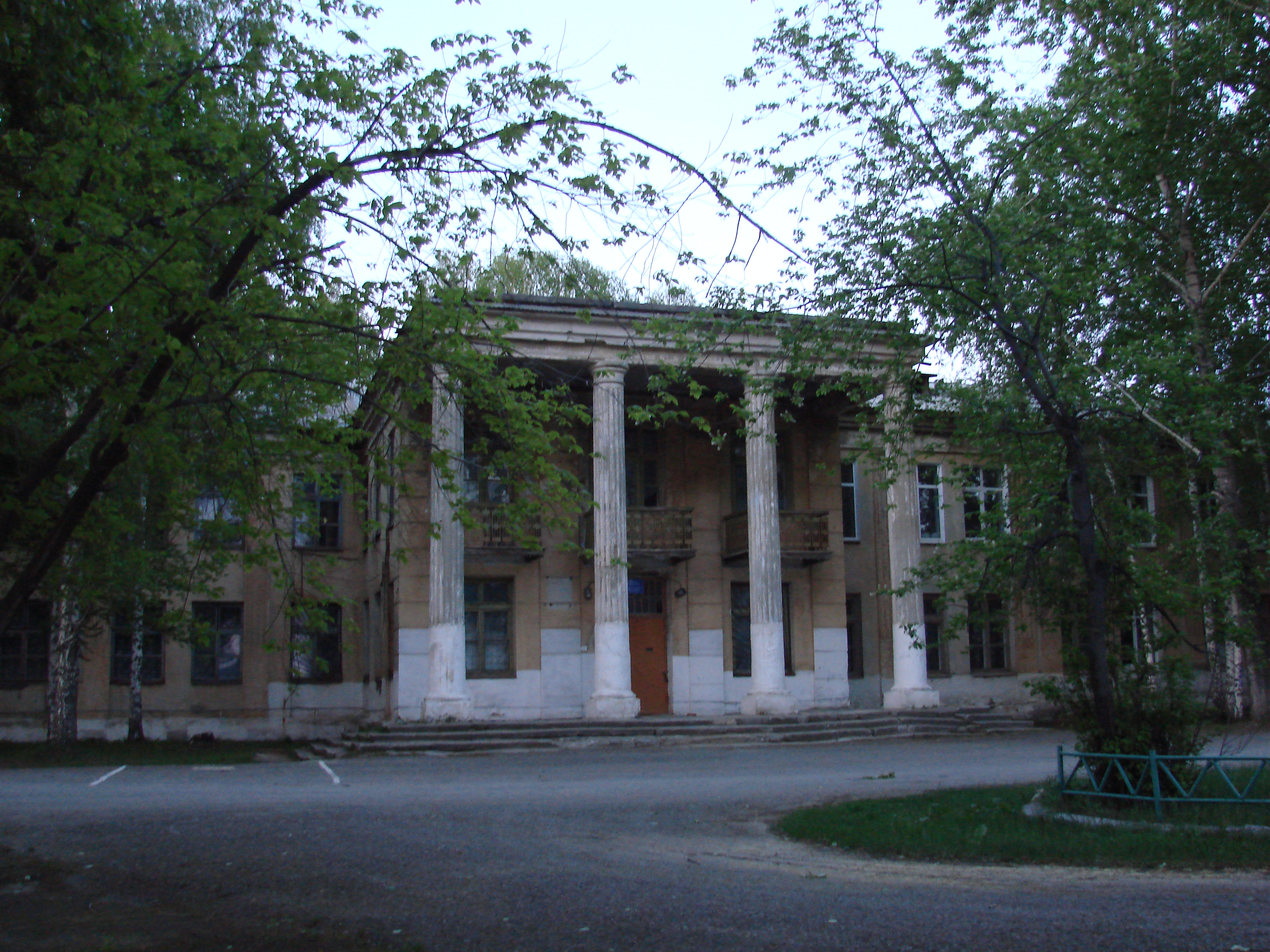 Верхний Уфалей, центральная городская больница